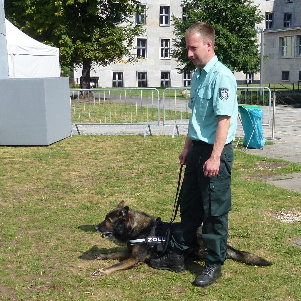 Hundestaffelvorführung der Zollhundeschule beim Tag der Offenen Tür im Bundesministerium der Finanzen